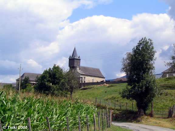 Eglise de Cihigue (Soule) Pyrénées).